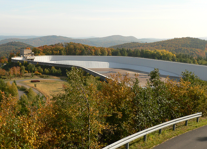 Oberbecken von Pumpspeicherwerk Waldeck